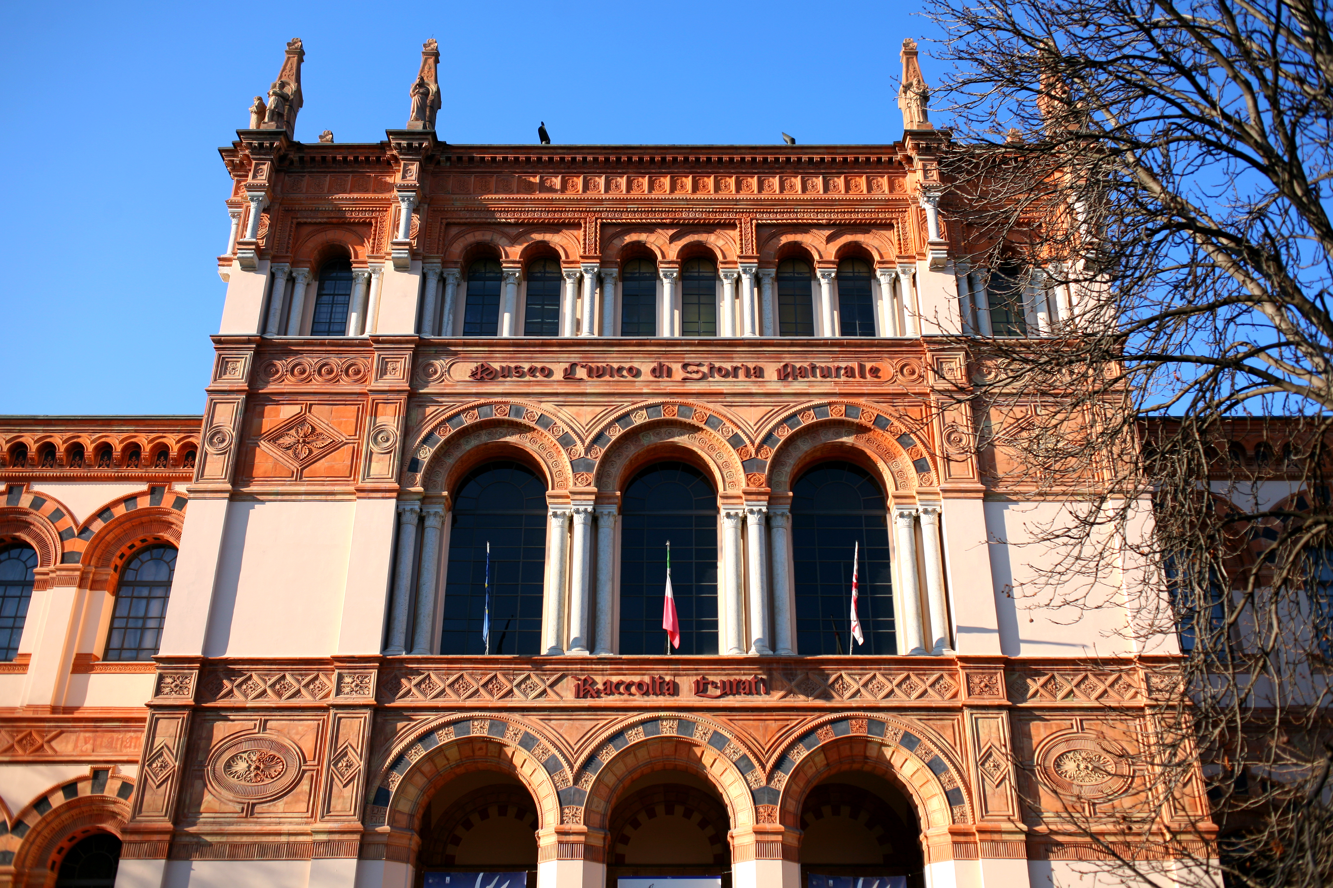 Veduta della facciata neoromanica del Museo civico di storia naturale di Milano (1888-1893) architetto Giovanni Ceruti